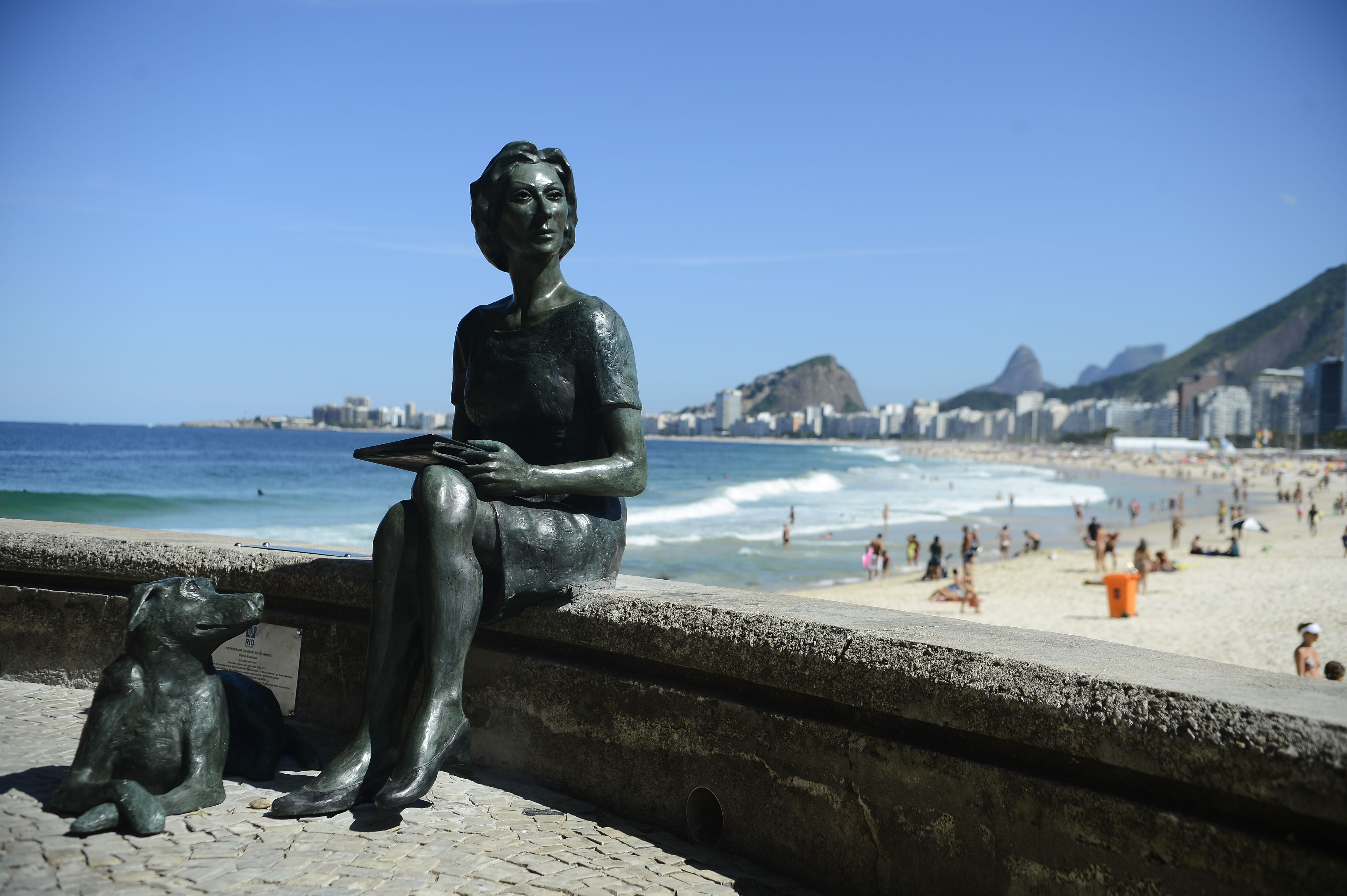 Rio de Janeiro - Estátua da escritora Clarice Lispector e seu cão Ulisses, criada pelo escultor Edgar Duvivier, no Leme (Fernando Frazão/Agência Brasil)